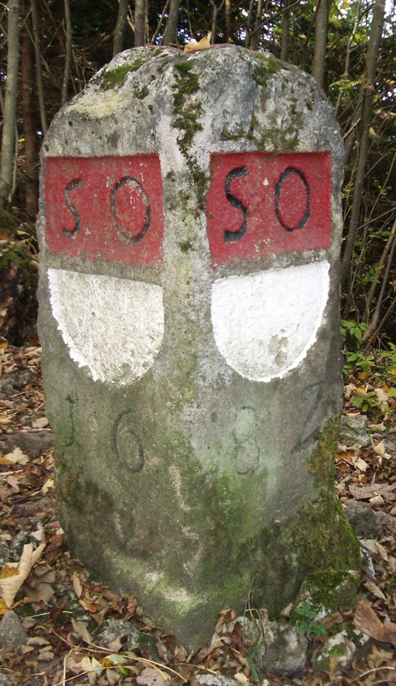 Border stone, Geissflue SO, Switzerland self-made, October 2005